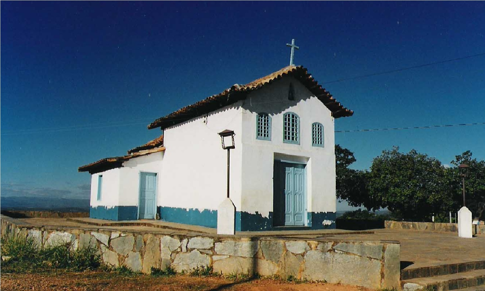 Capela de Nossa Senhora da Conceição em Lagoa Santa/MG - Fonte: Prefeitura Municipal de Lagoa Santa